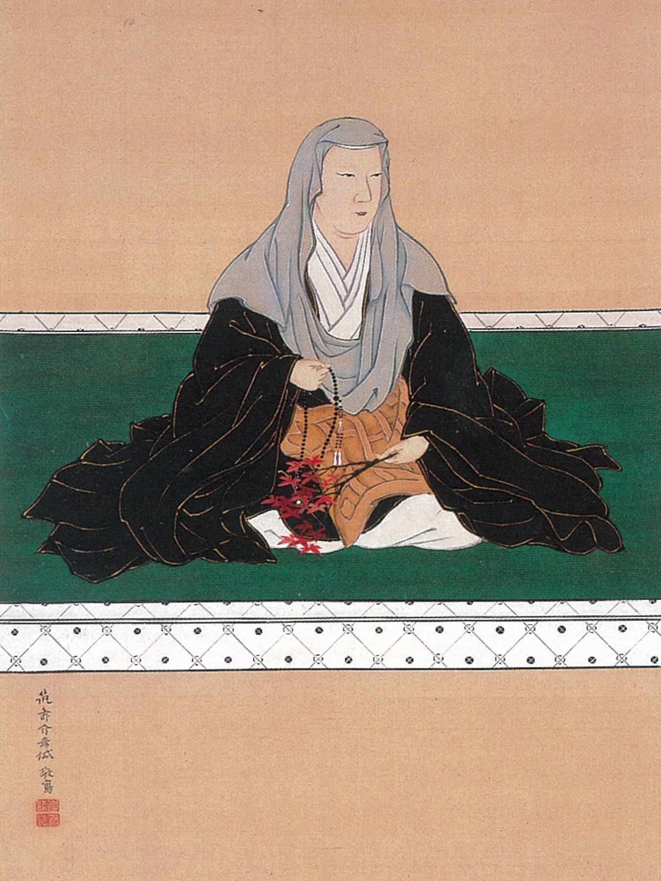 平安時代の女性・小督の肖像画。